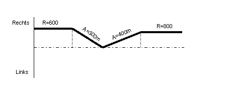 de=Krümmungsband einer C-Klotoide